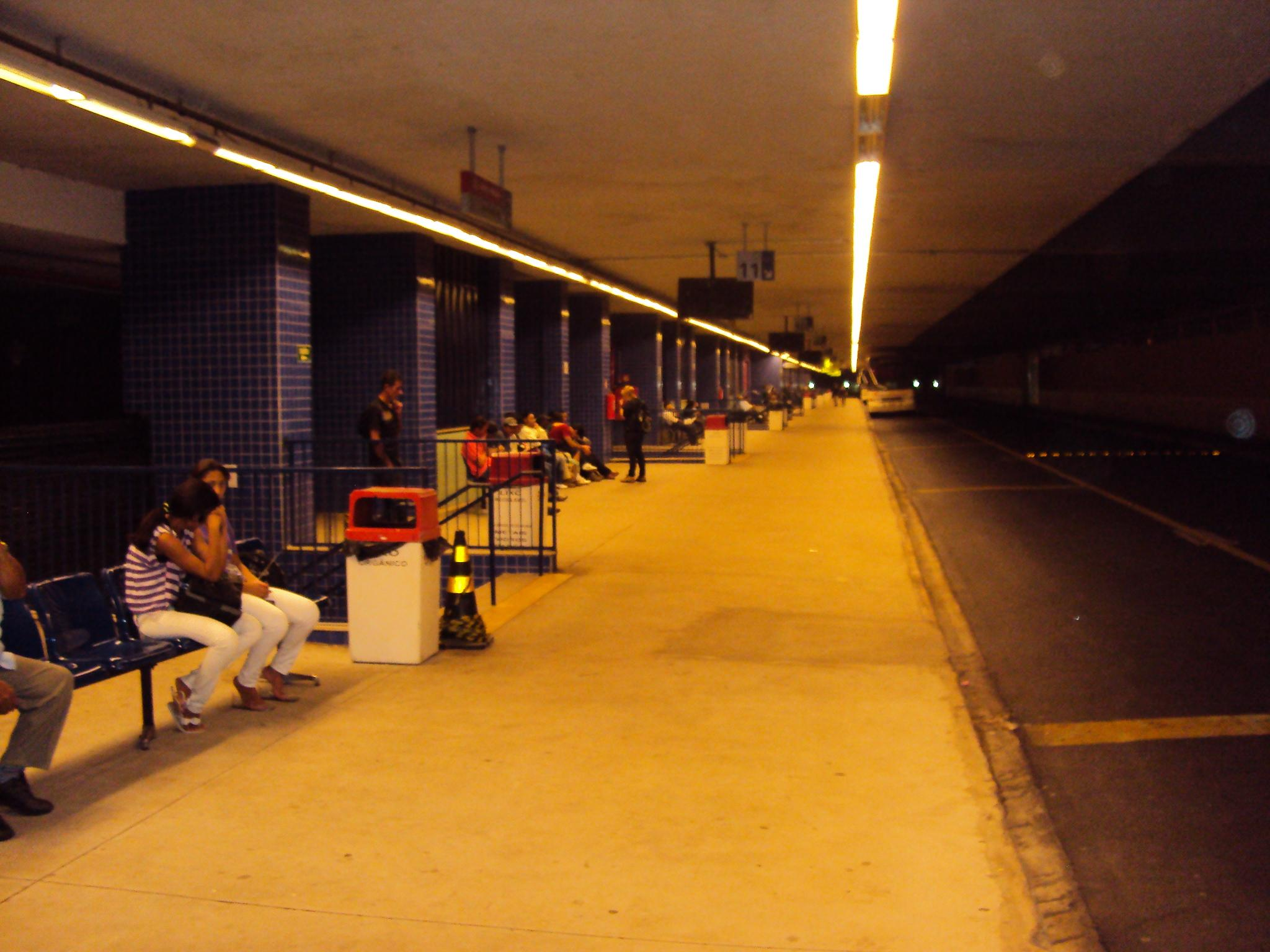 Terminal Sub-Metropolitano